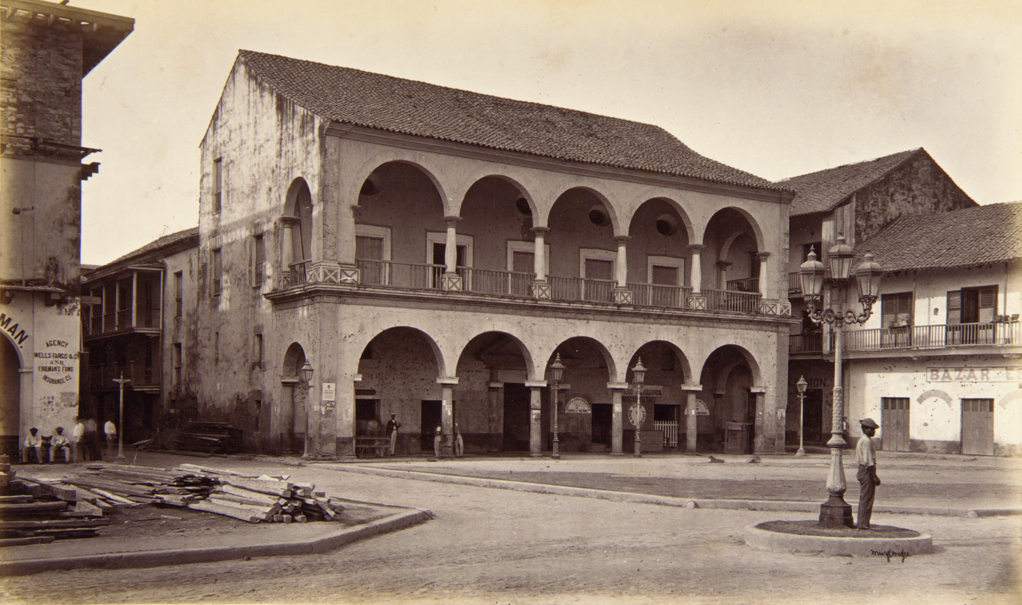 Foto del Antiguo Cabildo de Panamá en 1876, esta estructura fue demolida totalmente por la Ley 9 de 1909.